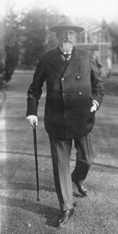 Wie Könige, Präsidenten und Minister ihr Wochenende feiern! Der Exzar Ferdinand von Bulgarien zieht es vor sein Wochenende im Garten seines Exiels in Coburg/Bayern in ausgedehnten Spaziergängen zu verbringen.